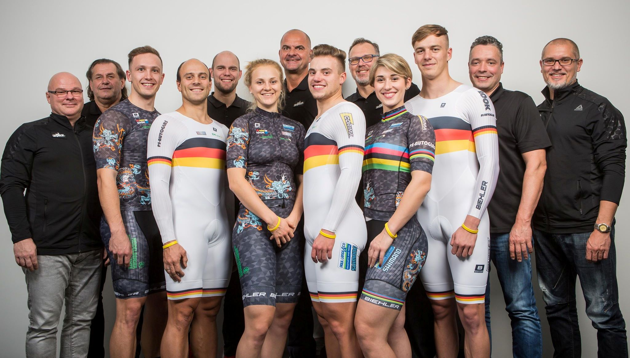 Teamfoto des Teams Erdgas.2012, v.l.n.r.: xx, Michael Hübner, Marc Jurczyk, Maximilian Levy, Sascha Hübner, Lea Friedrich, xx, Maximilian Dörnbach, xx, Pauline Grabosch, Nik Schröter, Jens Fiedler, xx